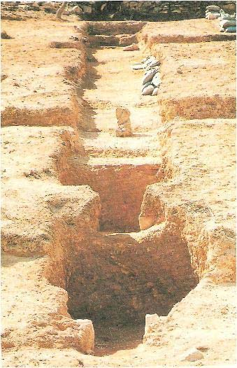 사적 제519호 고흥 운대리 분청사기 요지 (高興 雲垈里 粉靑沙器 窯址)